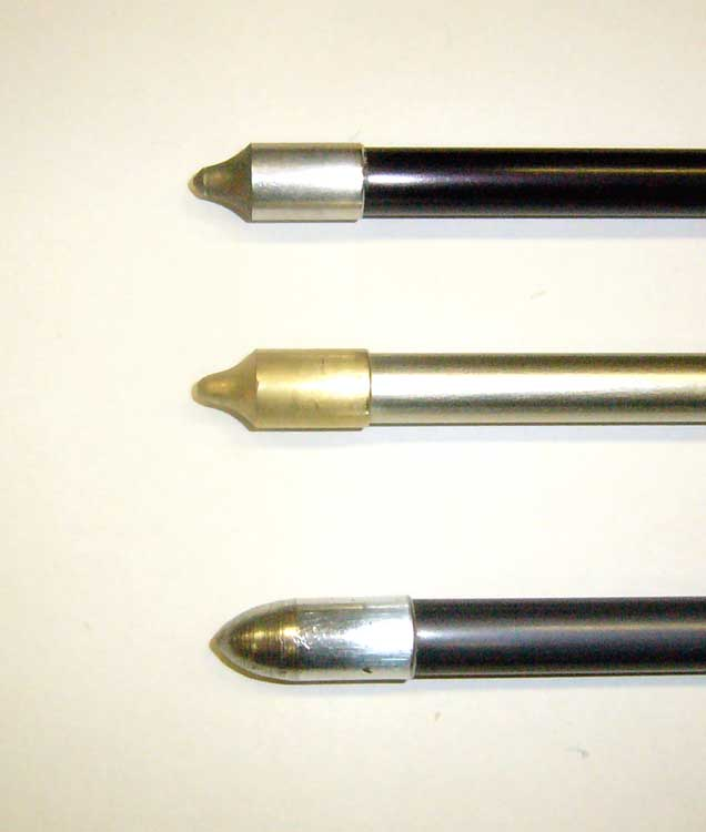 Kyudo Ya/Arrow.